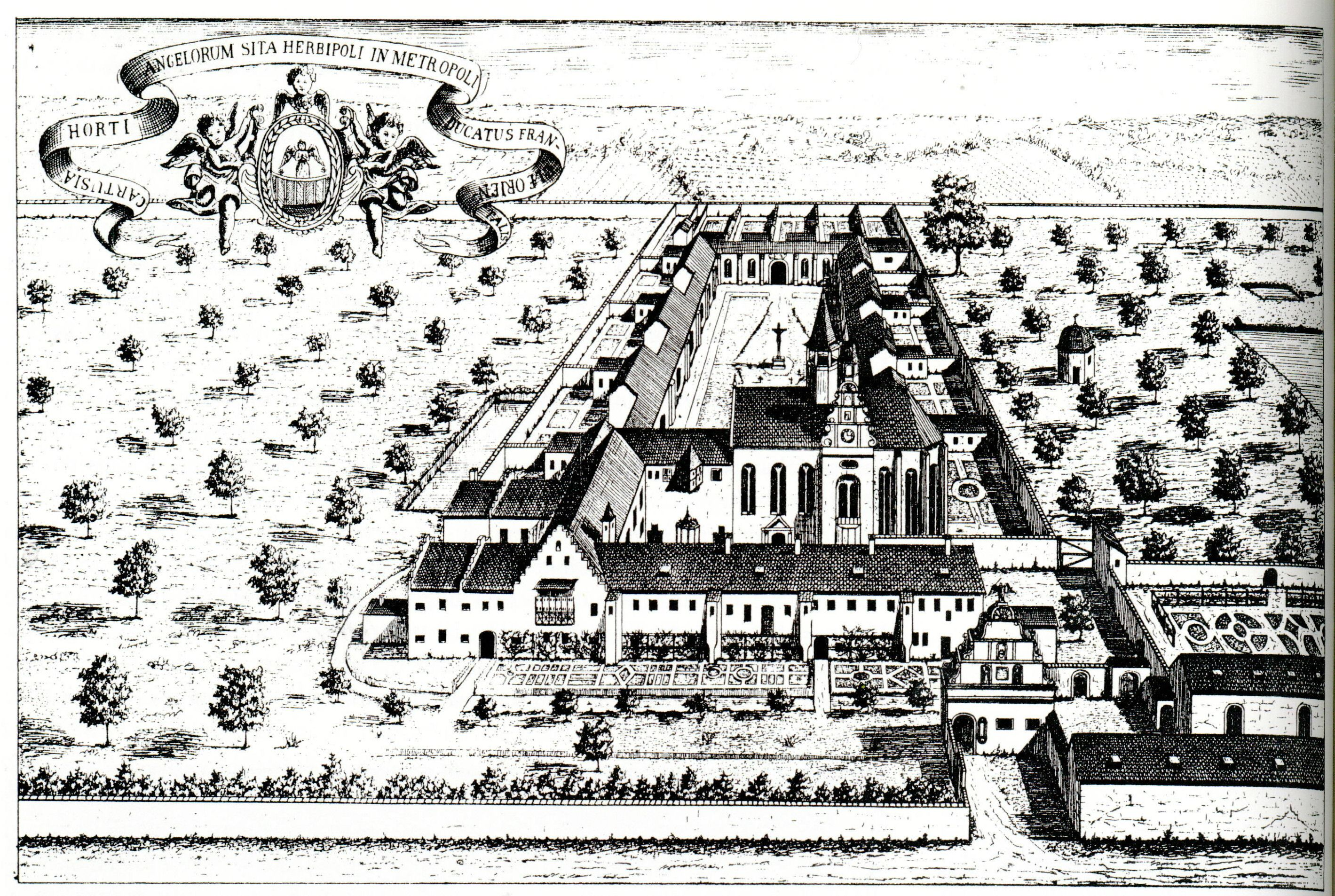 Kartause, Würzburg, graphische Ansicht.